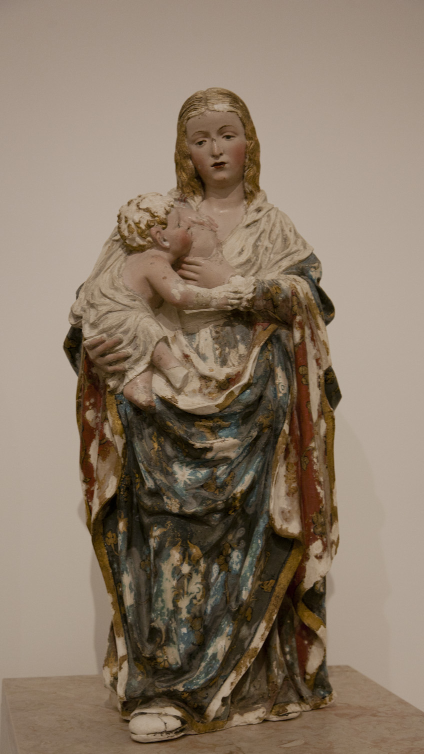 Mestre dos Túmulos Reais, Virgem do Leite, 1520-1525, Museu Machado Castro